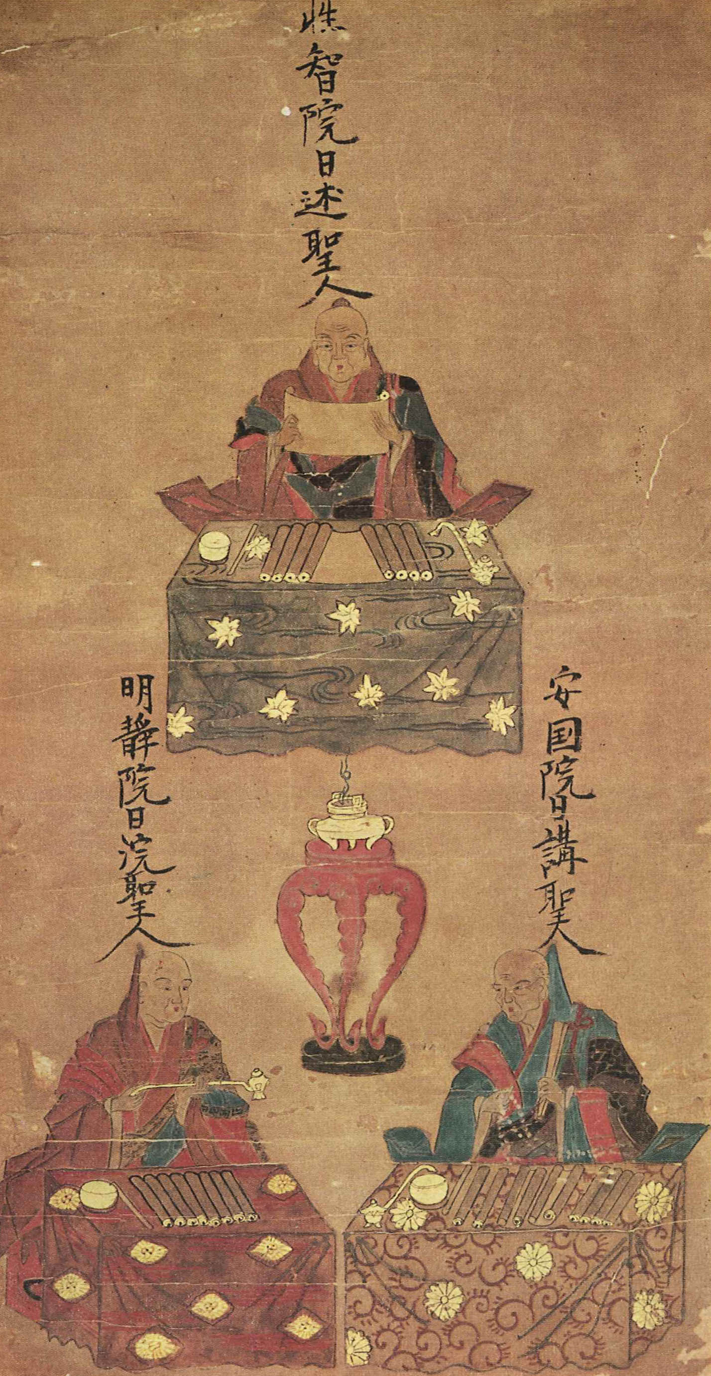 不受不施 安国院日講